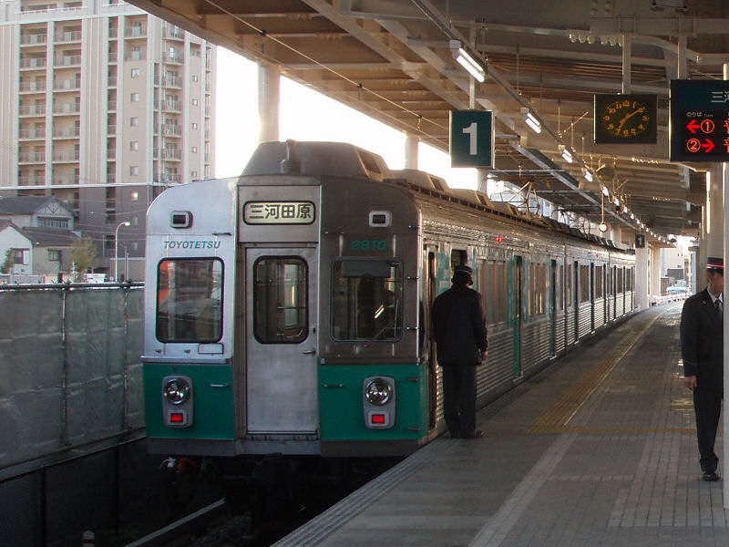 豊橋鉄道1800系電車1810F